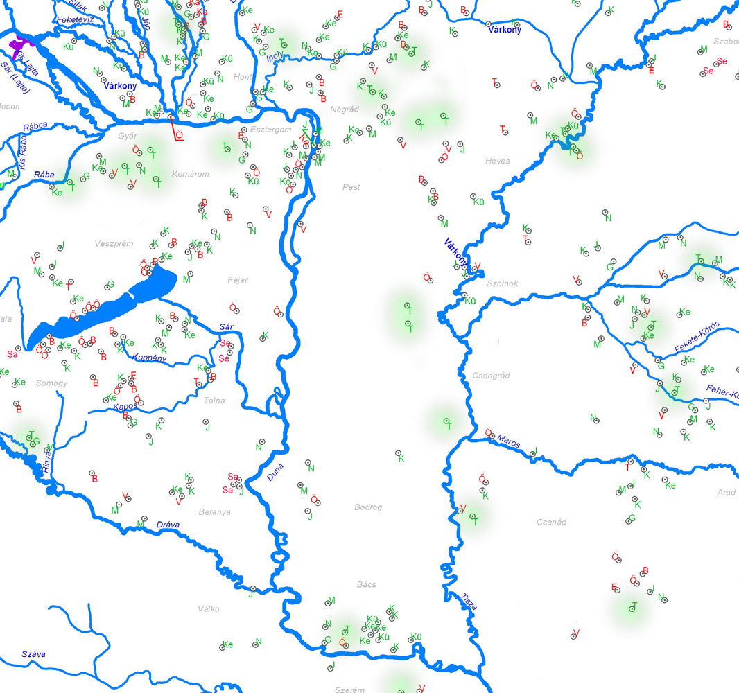 A tarján törzsnév elterjedése a Kárpát-medencében